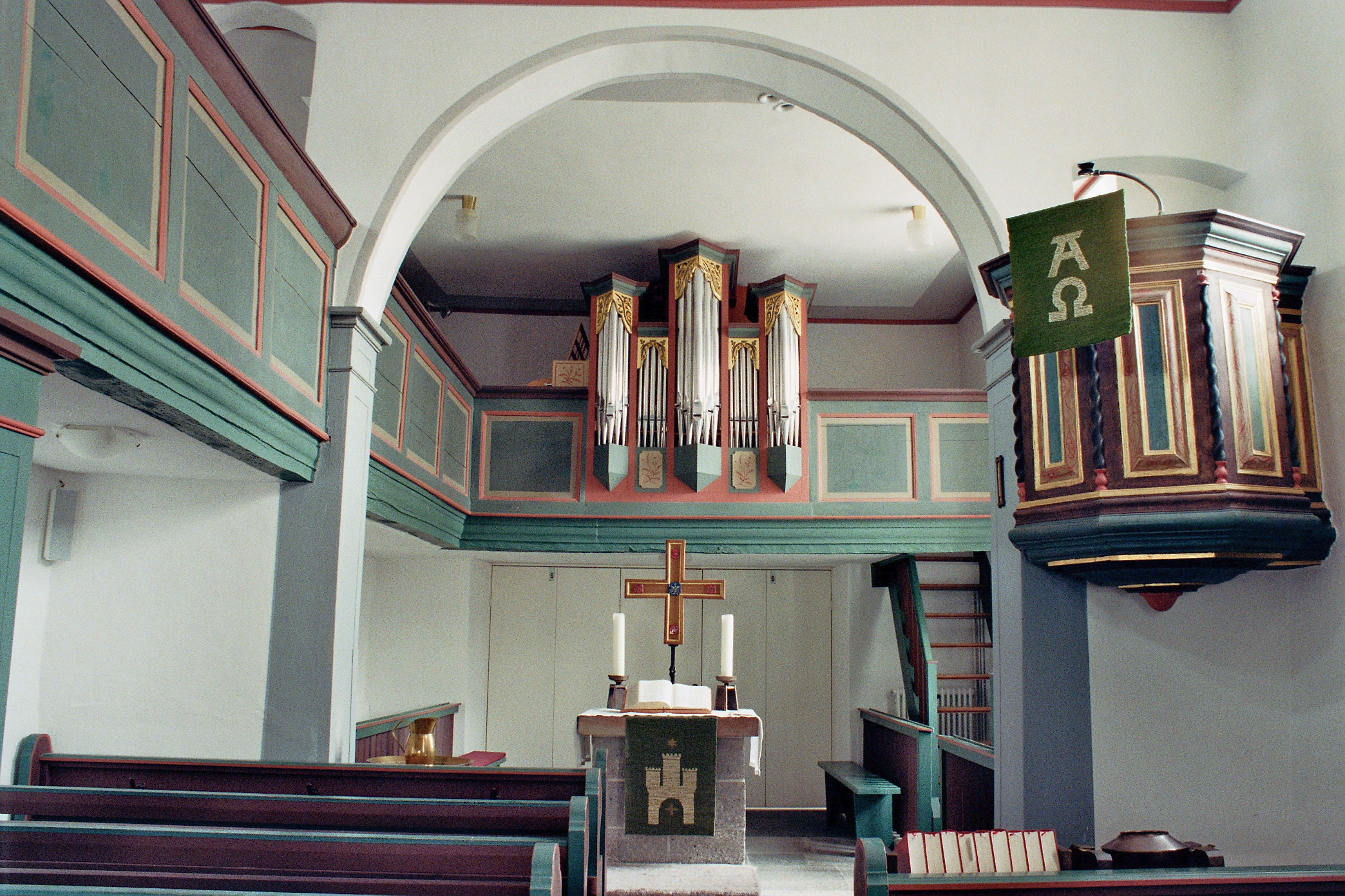 Orgel der Evangelischen Kirche Bersrod, Gemeinde Reiskirchen, Landkreis Gießen, Hessen, Deutschland